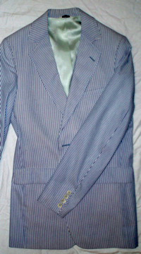 A seersucker jacket.